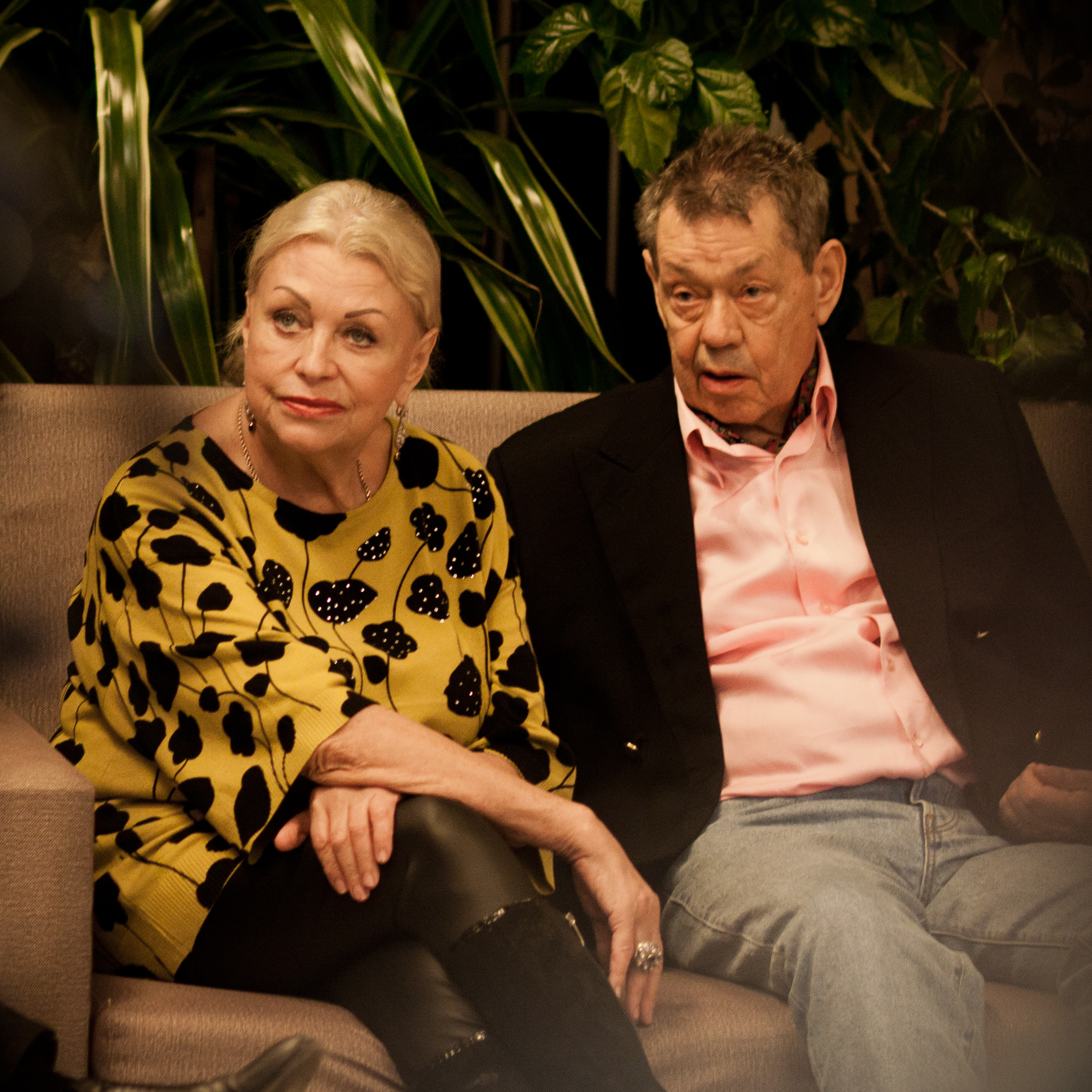 Николай Караченцов с женой Людмилой Поргиной (Московский дом книги, презентация диска Елены Суржиковой)